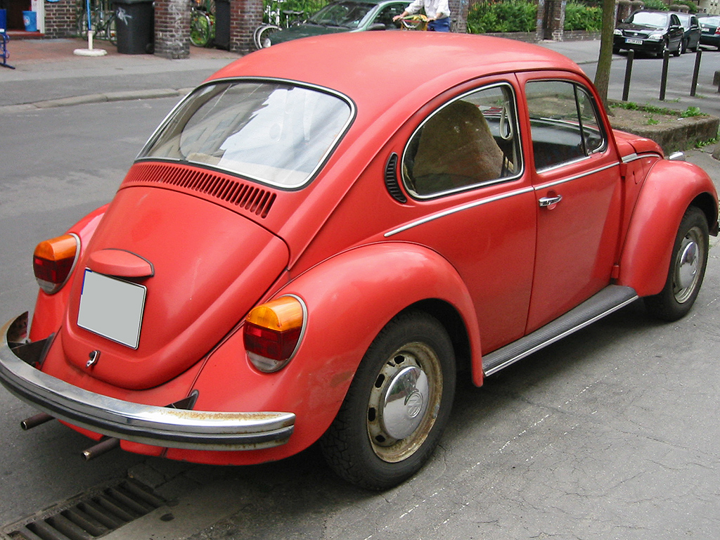 Beschreibung: VW Käfer (Beetle) Quelle: selbst fotografiert Fotograf: Sven Storbeck